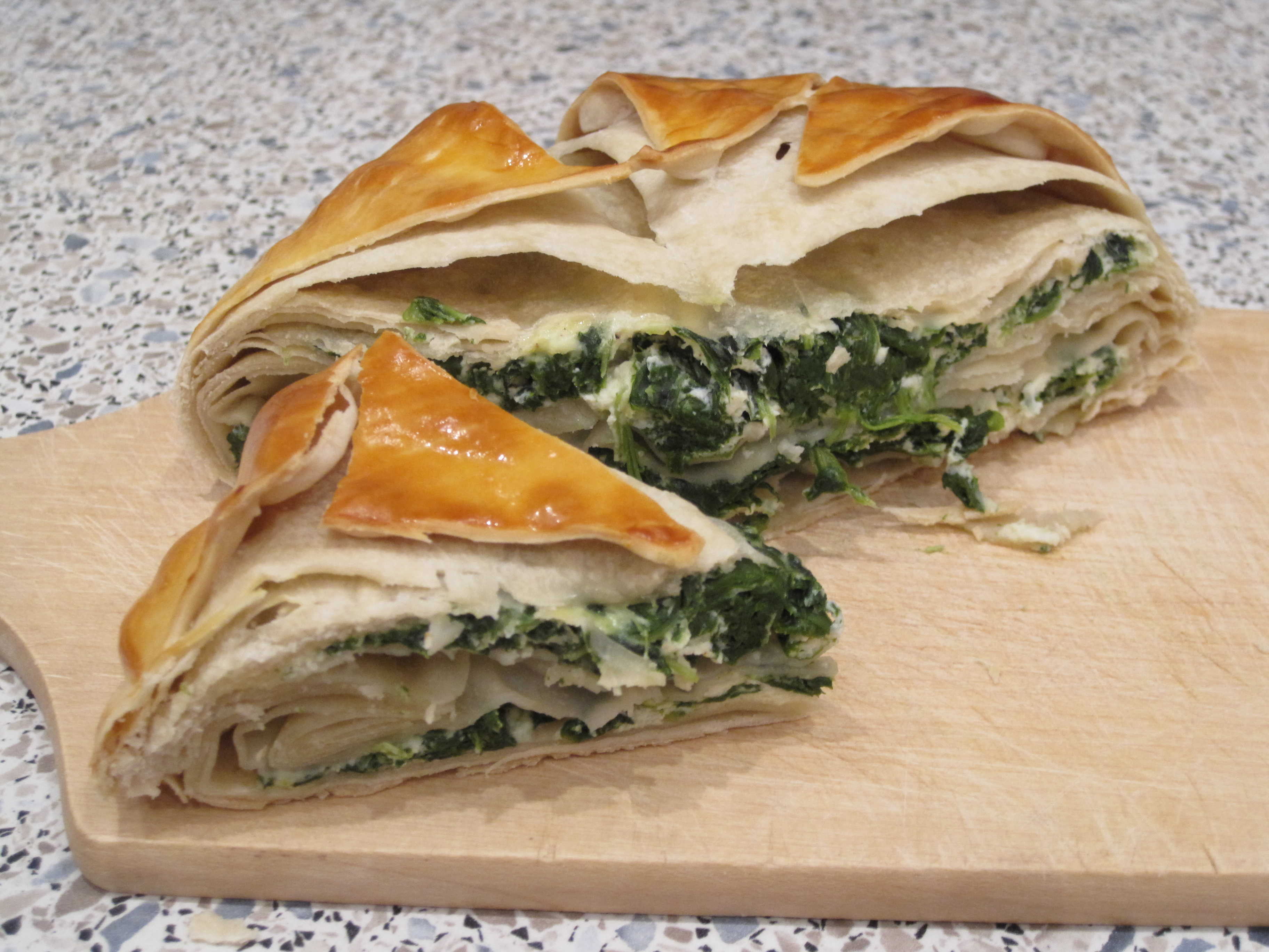 Spinatpita aus selbstgemachten Pita-Blättern. Ist auch unter dem Begriff Börek bekannt.